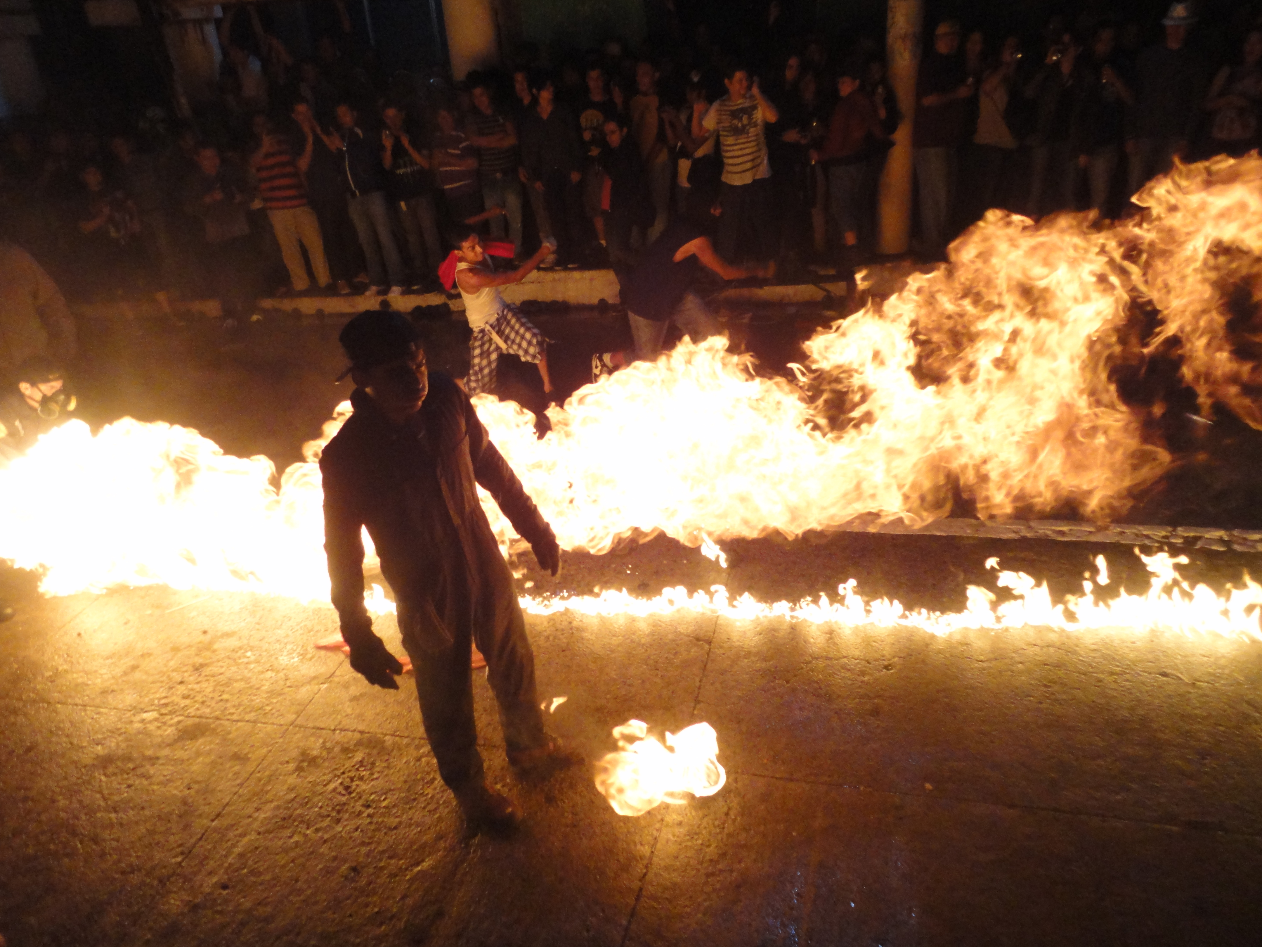 Llamas, Festival Bolas de Fuego en Nejapa, Celebrado cada 31 de Agosto.